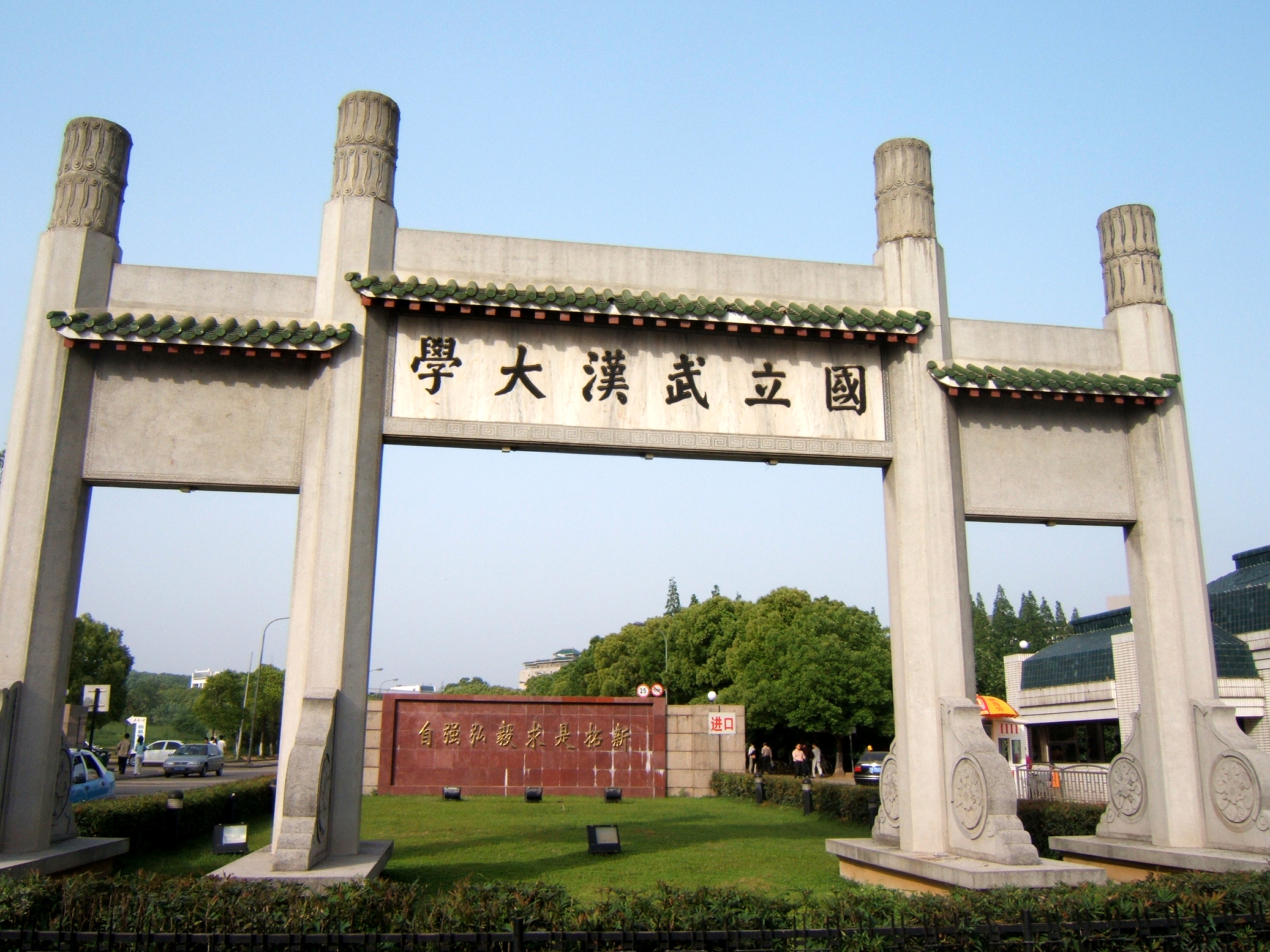 武汉大学大门牌坊。